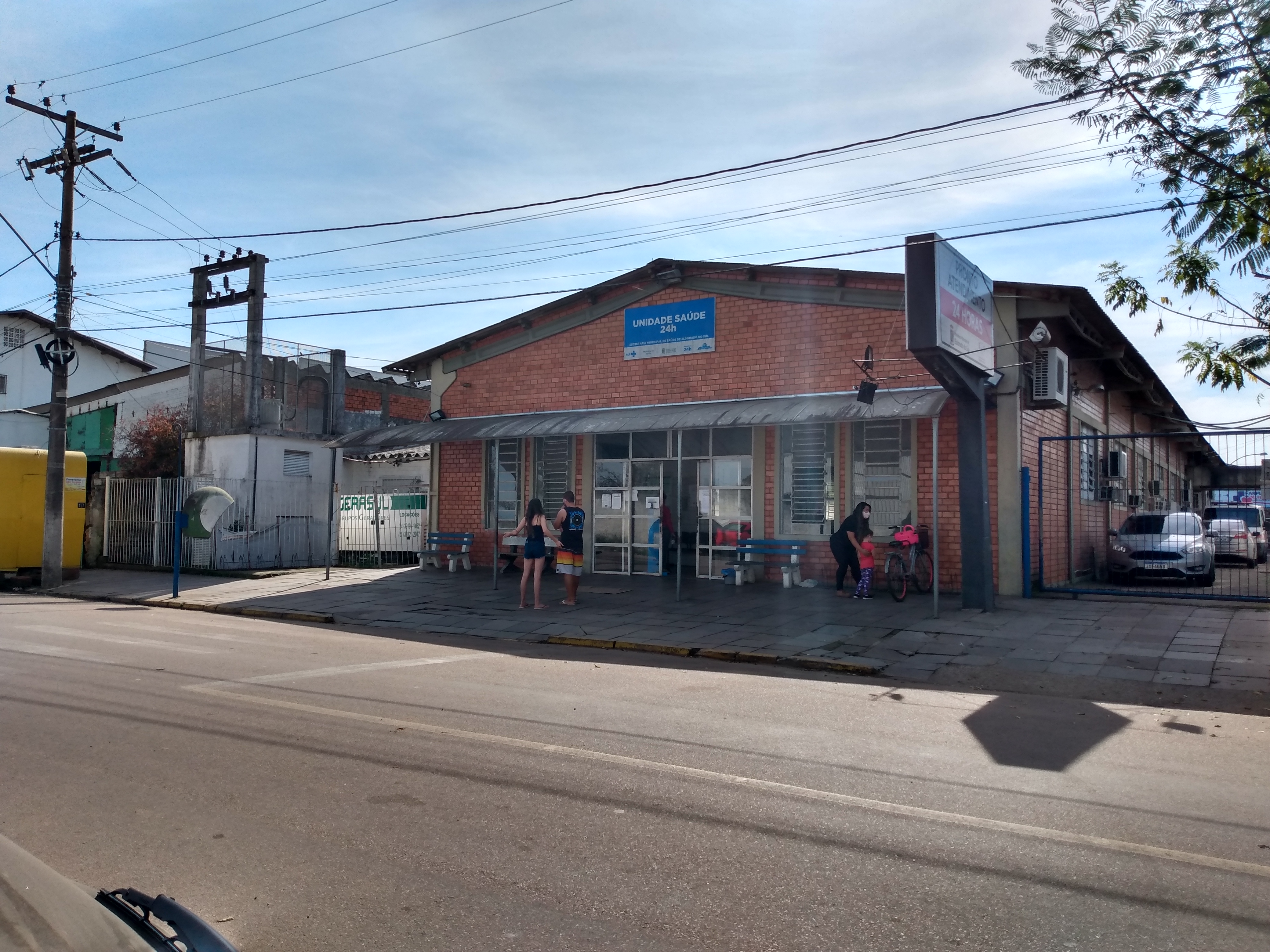 Centro de pronto atendimento do bairro Cidade Verde